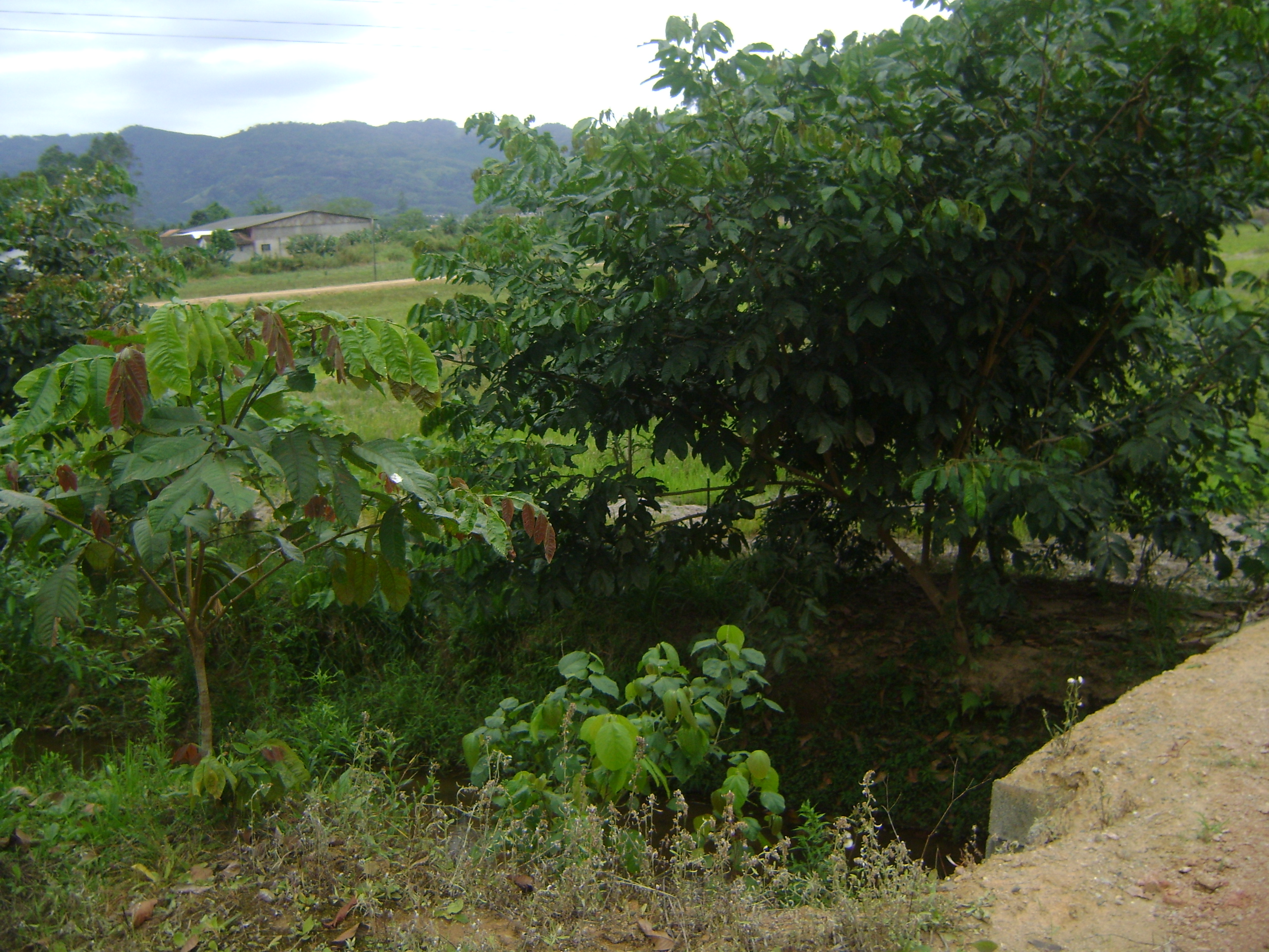 Rodeio S.C.Brasil